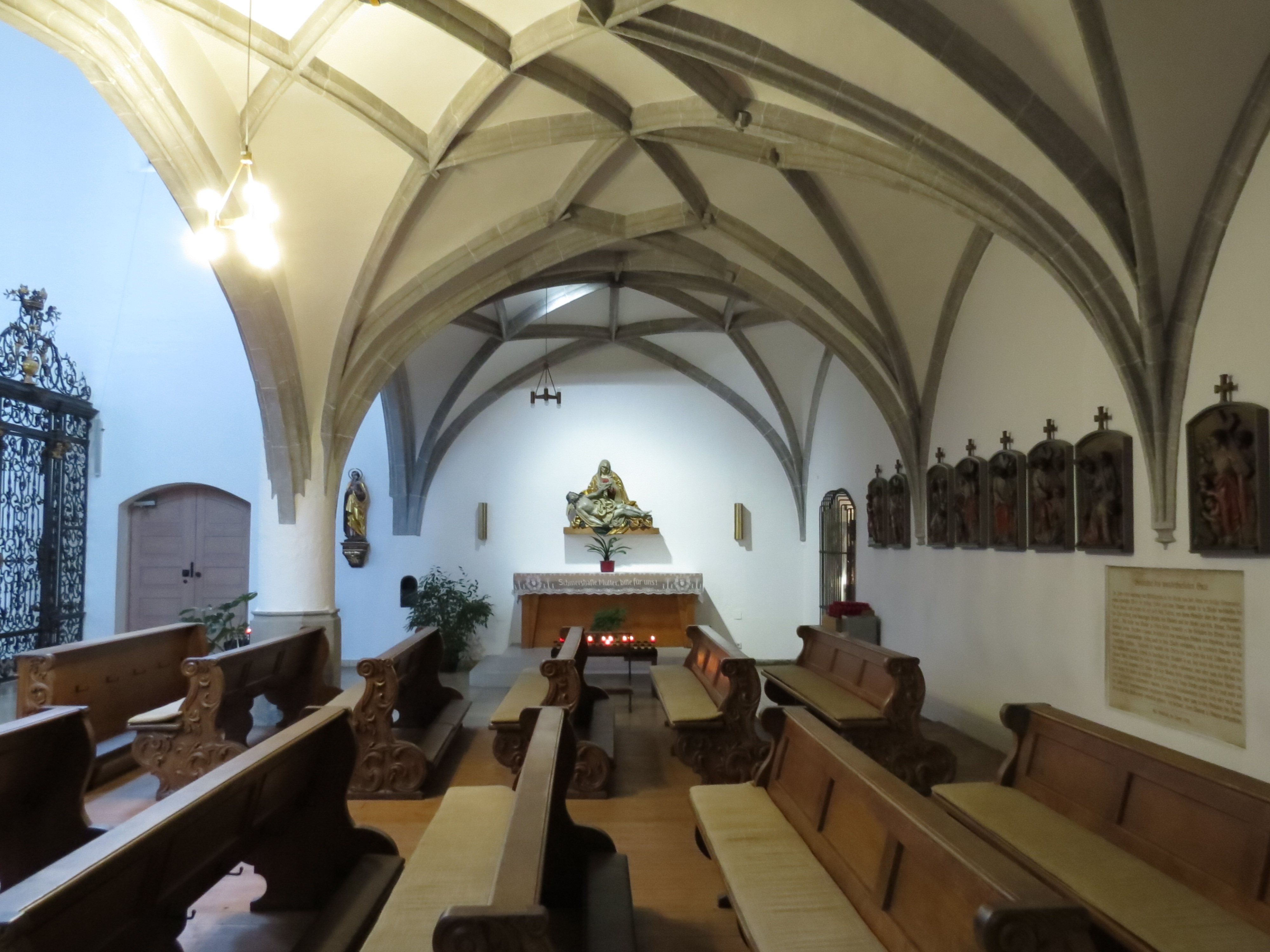 Katholische Heilig-Kreuz-Kirche in Augsburg. Unter der Empore.